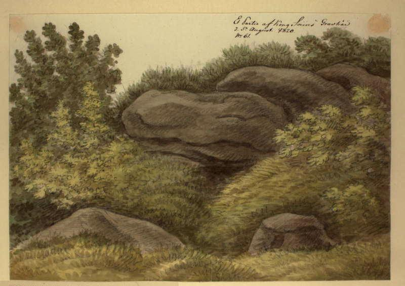 Et Partie af Kong Sviins Gravhöi d 5 August 1820. No. 61. Udgivet: 1820. Udgivelsesår: 1820. 239 x 336 mm : Akvarel. Rawert, Ole Jørgen, 1786-1851. Pederstrup, Kong Svends Høj - Danmark ; Jættestue ; Stengrav. Rawerts maleriske Reise III, 66 a